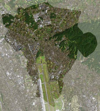 Mizuhomachi, Tokyo, Japan